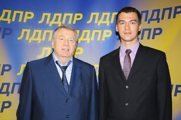 Владимир Жириновский и Михаил Дегтярёв